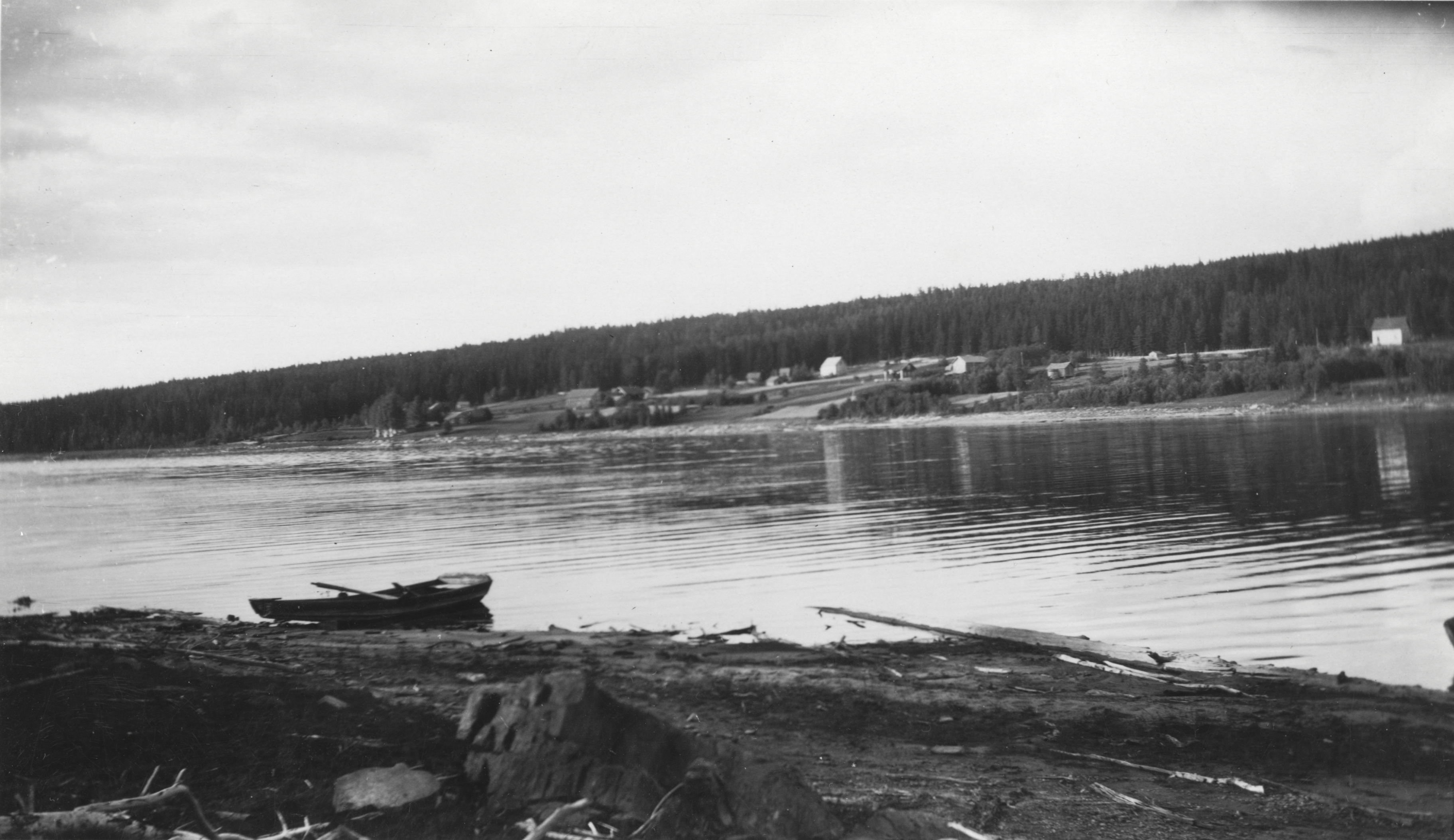 Frysjøen i Grue, Hedmark